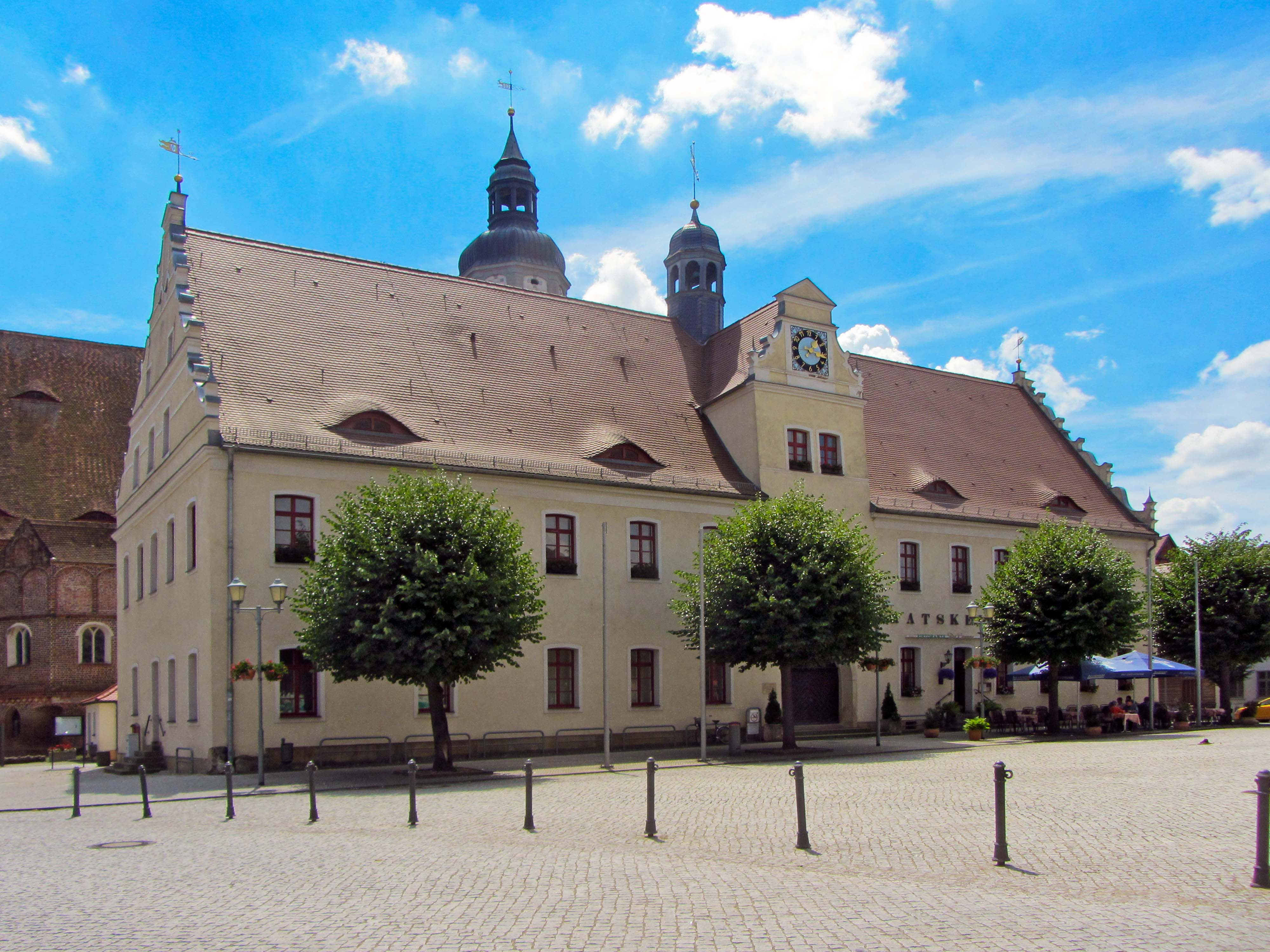 Rathaus, Markt 1 in Herzberg (Elster)